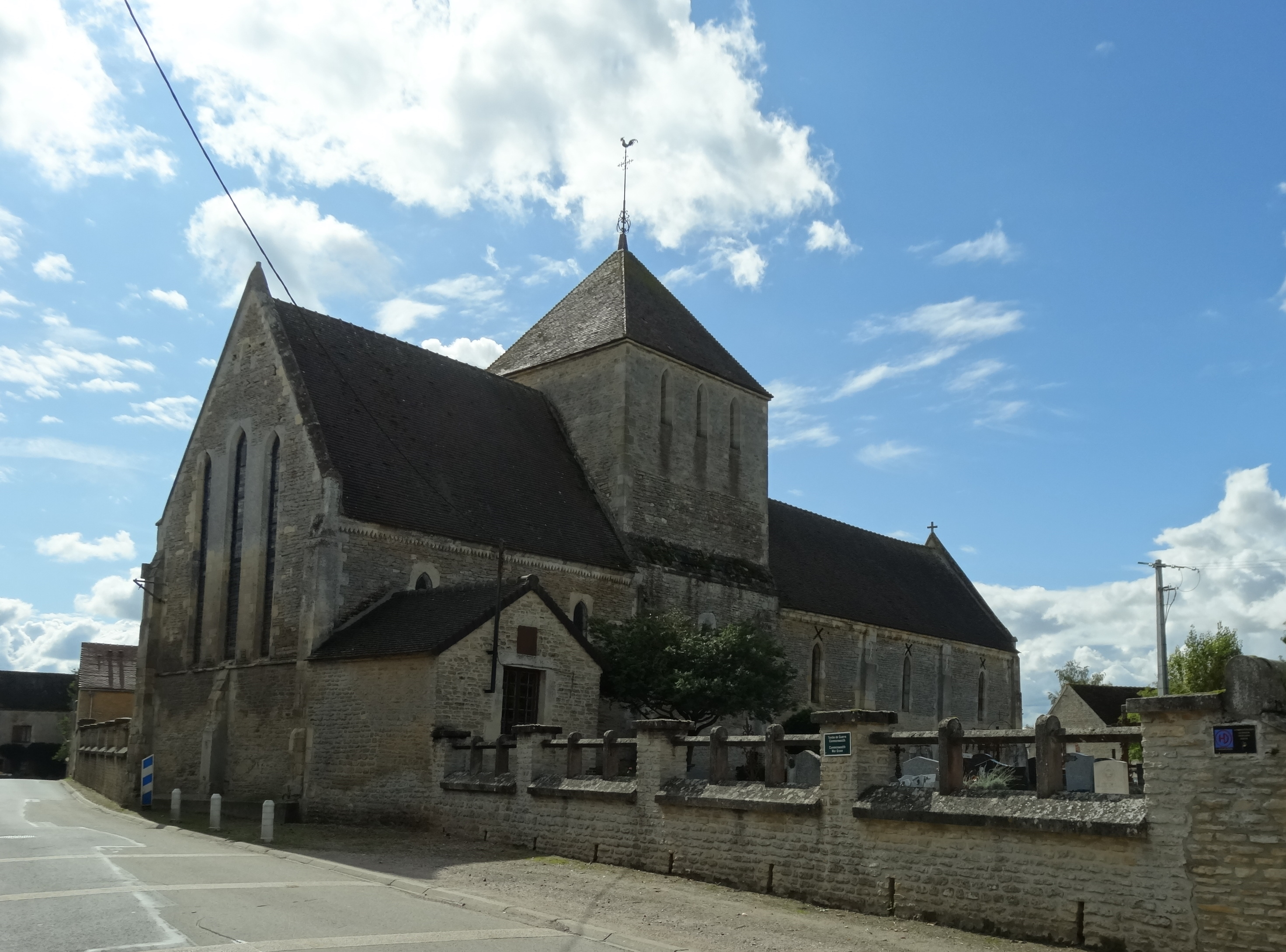 Percy en Auge (Calvados) Le chevet de l'église est percé d'un triplet de baies en lancettes